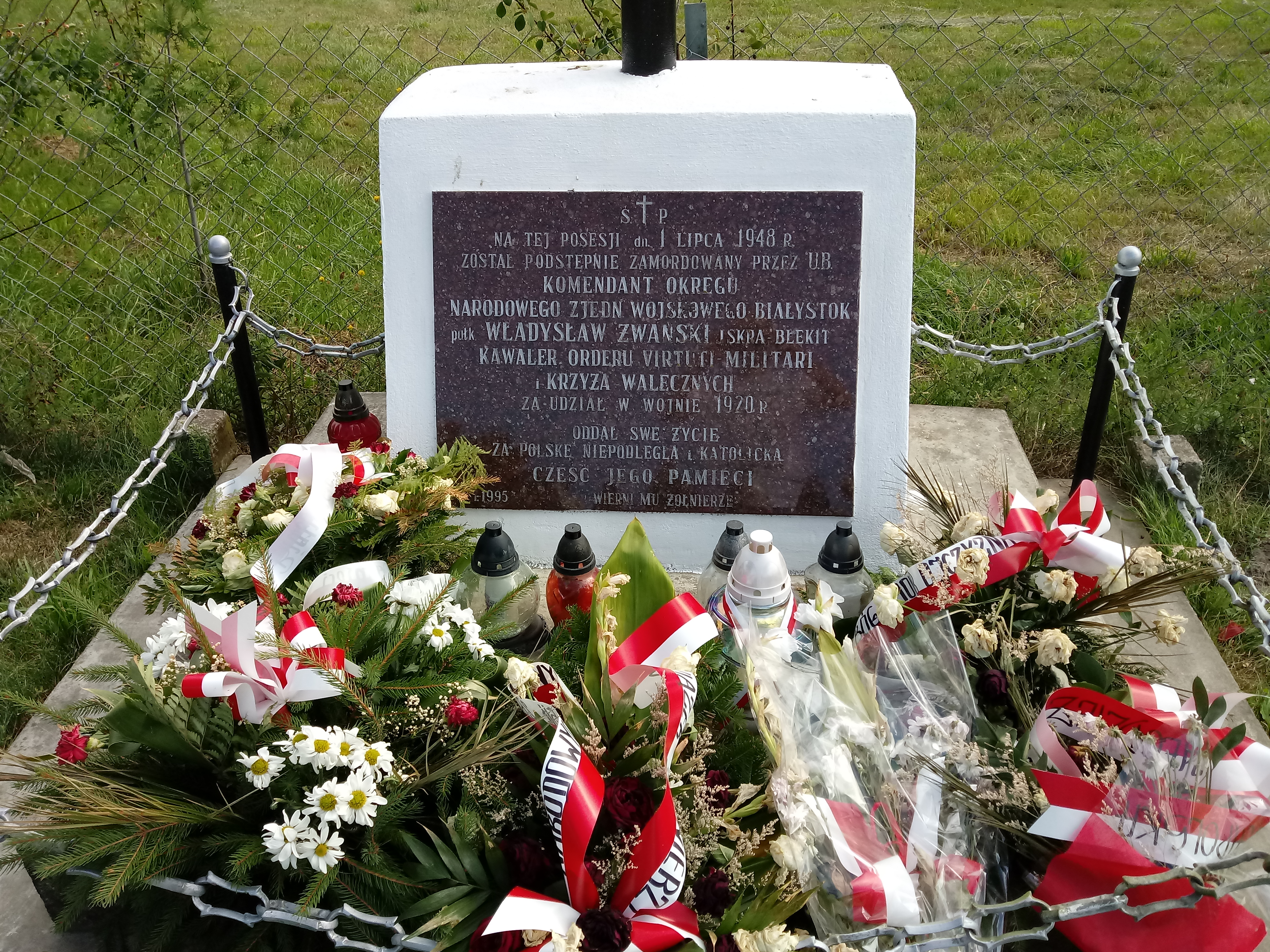 Pomnik upamiętnia miejsce śmierci ppłk. Władysława Żwańskiego. Miejsce pochówku pozostaje do dzisiaj nieznane.